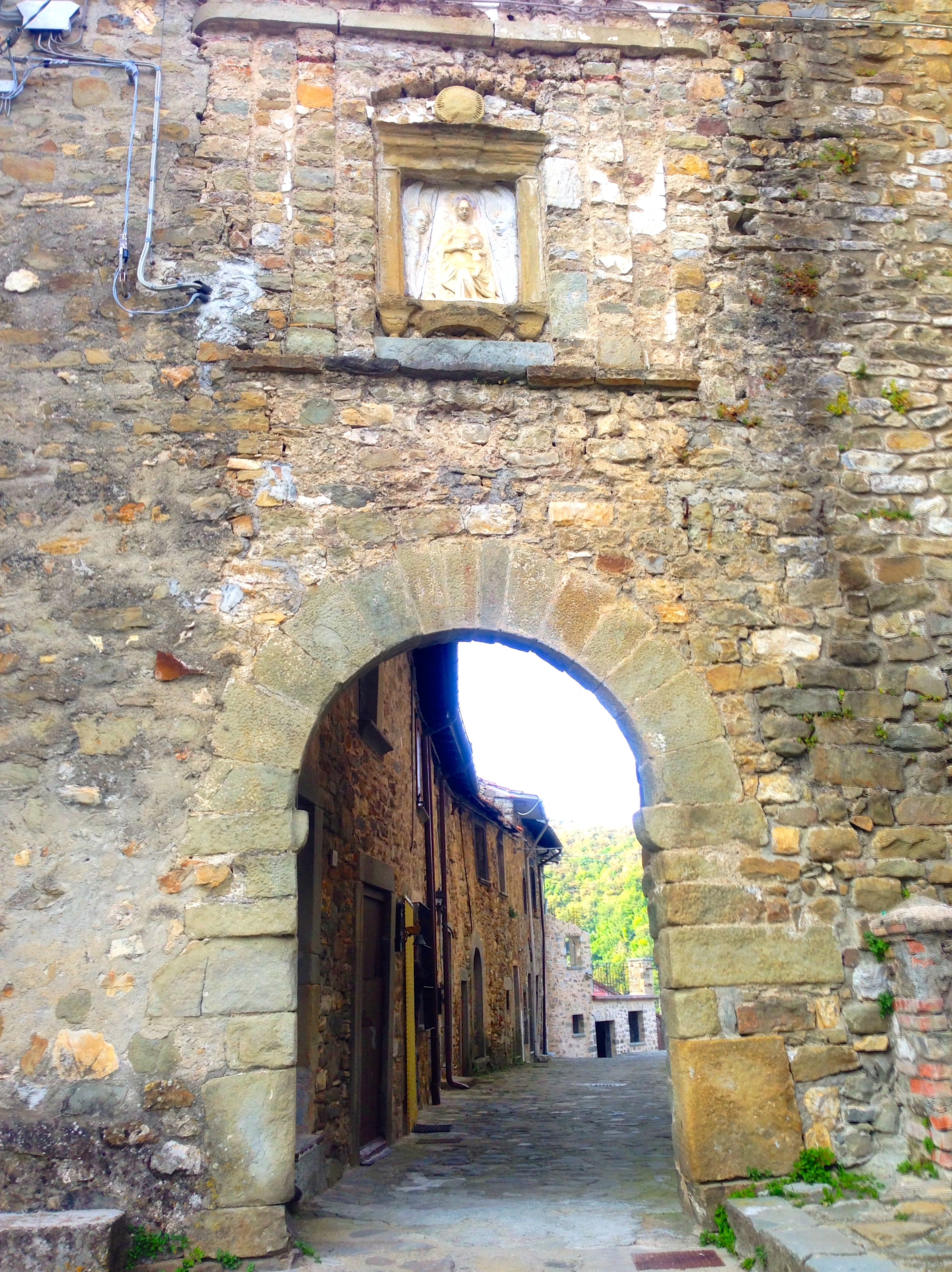 Madonna del Borgo di Castevoli, Mulazzo (MS) Summary Madonna con Bambino del XV secolo